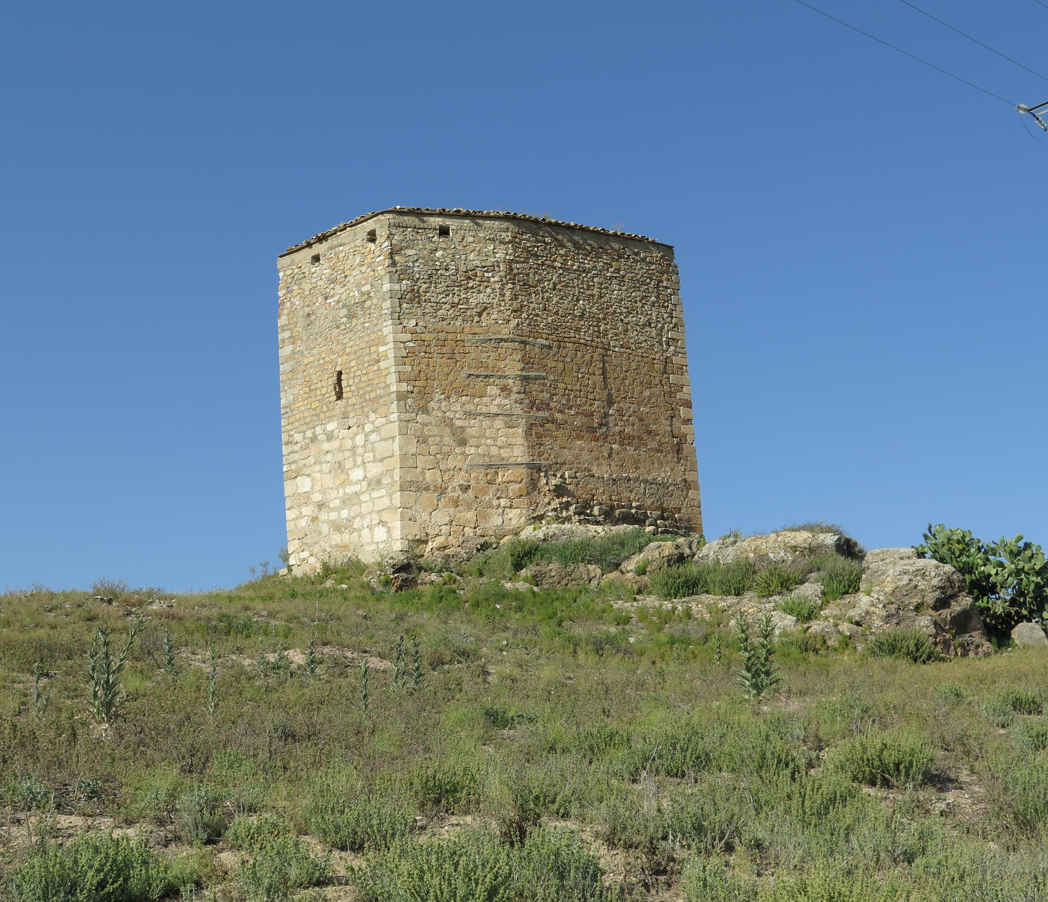 Castillo del Jarafe.